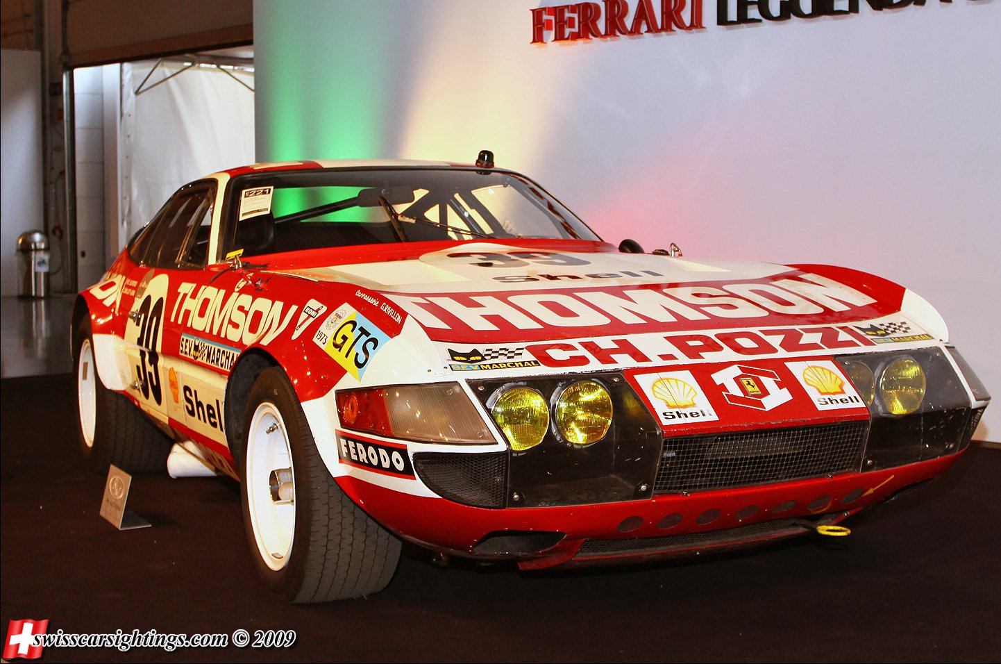 Ferrari 365 GTB4/Daytona Competizione